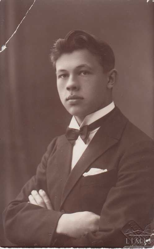 Juozas Ambrazevičius-Brazaitis (1903 m. gruodžio 9 d. Trakiškiuose, Marijampolės valsčius – 1974 m. lapkričio 28 d. South Orange, Naujasis Džersis, JAV) – Lietuvos literatūrologas, pedagogas, antinacistinės ir antisovietinės rezistencijos dalyvis, visuomenės veikėjas. 1941 m. birželio sukilime ėjo Lietuvos laikinosios vyriausybės ministro pirmininko pareigas.